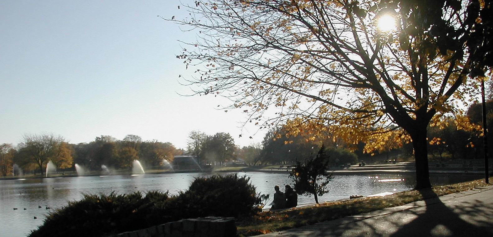 Pole Mokotowskie w Warszawie. 25 października 2005 r.